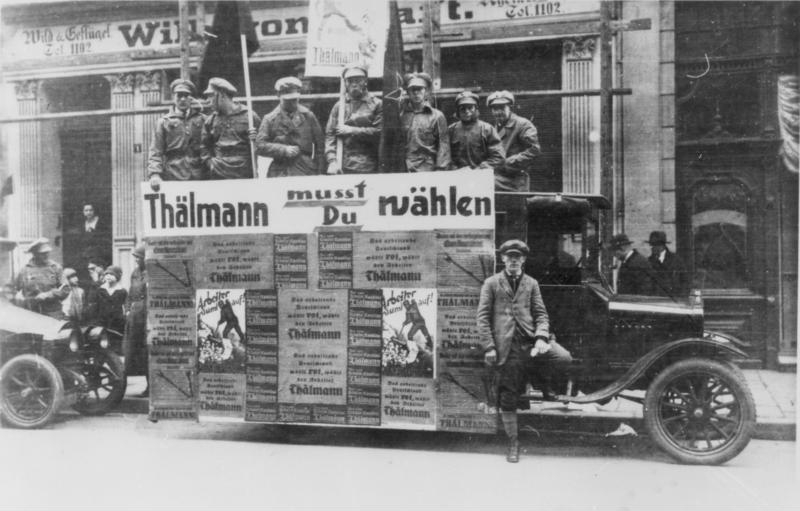 Essen, Reichspräsidentenwahl, KPD-Wahlwerbung ADN-ZB/Archiv Wahlagitation der KPD in Essen zur Reichspräsidentenwahl im März 1925 [Essen.- KPD-Wahlwerbung mit LKW und Plakat "Thälmann musst Du wählen" zur Reichspräsidentenwahl]